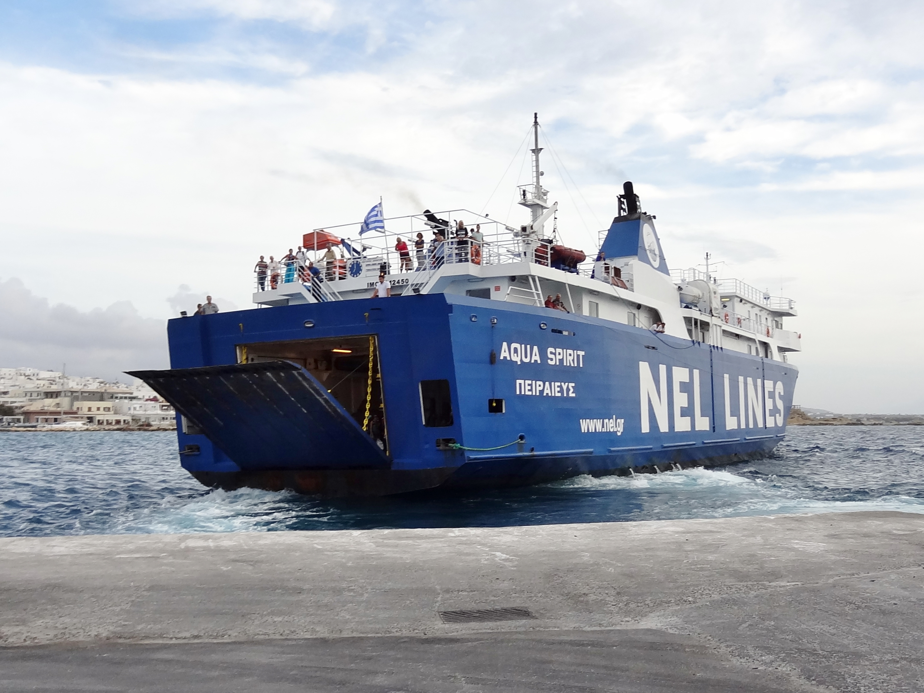 Aqua Spirit im Hafen von Chora auf Naxos, Kykladen, Griechenland